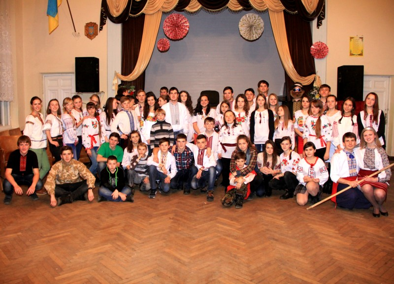 Андріївські вечорниці у Новому Роздолі 2014